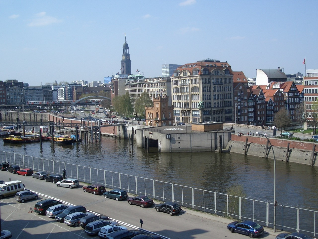 Vorsetzen Blick über den Binnenhafen, Hamburg-Altstadt. Vorne das Nikolaisperrwerk am Kajen mit der Mündung des Nikolaifleetes in den Zollkanal. Im Hintergrund die St. Michaeliskirche. This is a photograph of an architectural monument.